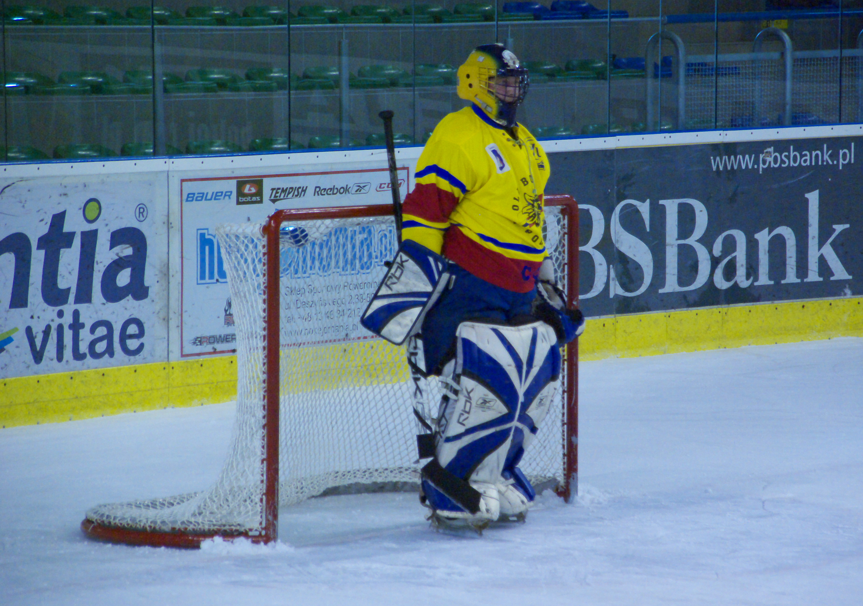 Marek Batkiewicz w barwach Old Boys Podhale, MP Sanok 2012